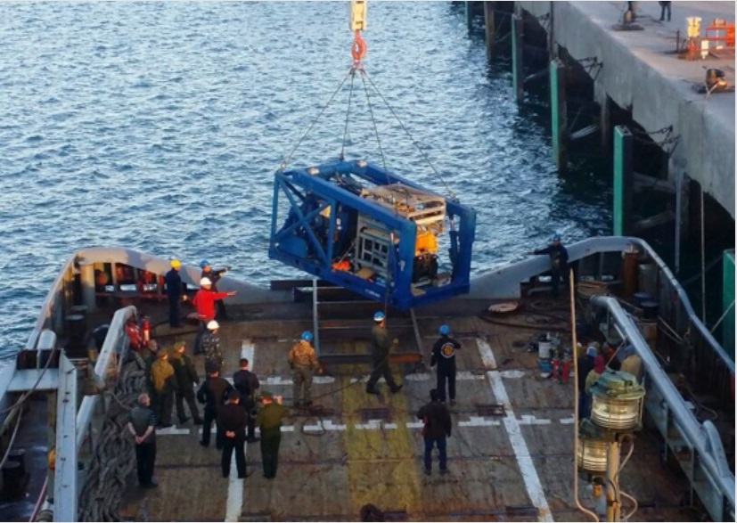 Descarga del buscador submarino ruso durante la busqueda del submarino argentino ARA San Juan